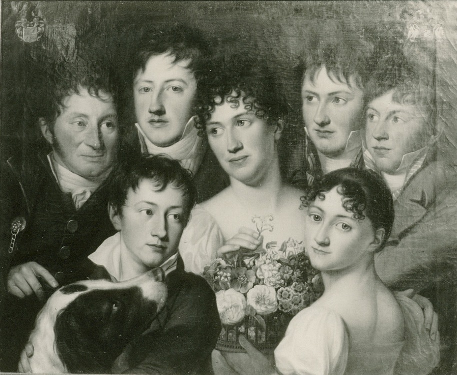 Maria Anna Wilhelmine von und zu Westerholt-Gysenberg (* 24. Juli 1774; † 3. November 1852 in Ostbevern) im Kreis ihrer Familie mit ihrem Ehemann Freiherr Friedrich Clemens von Elversfeldt genannt von Beverförde zu Werries